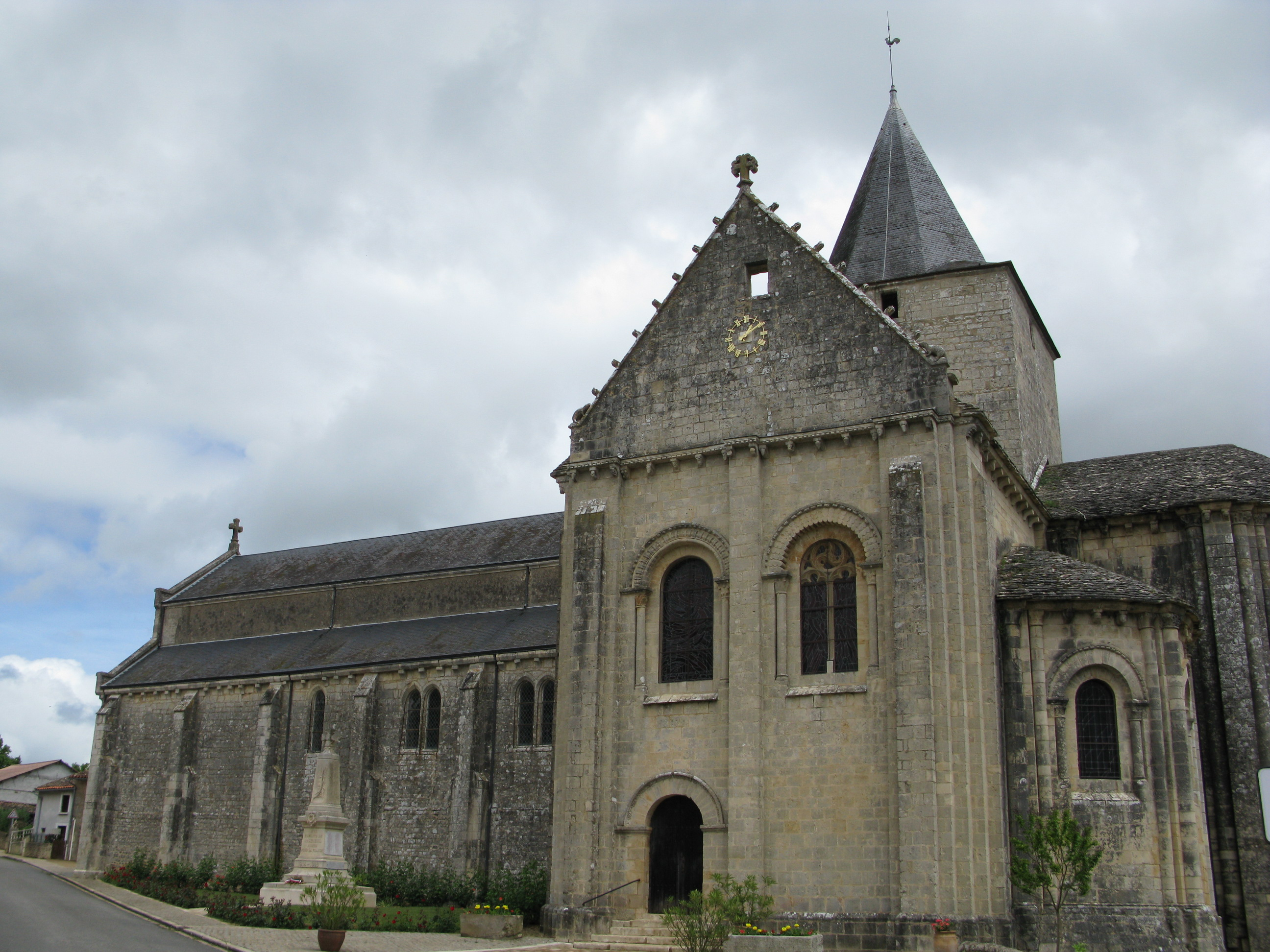 L'église de Jazeneuil